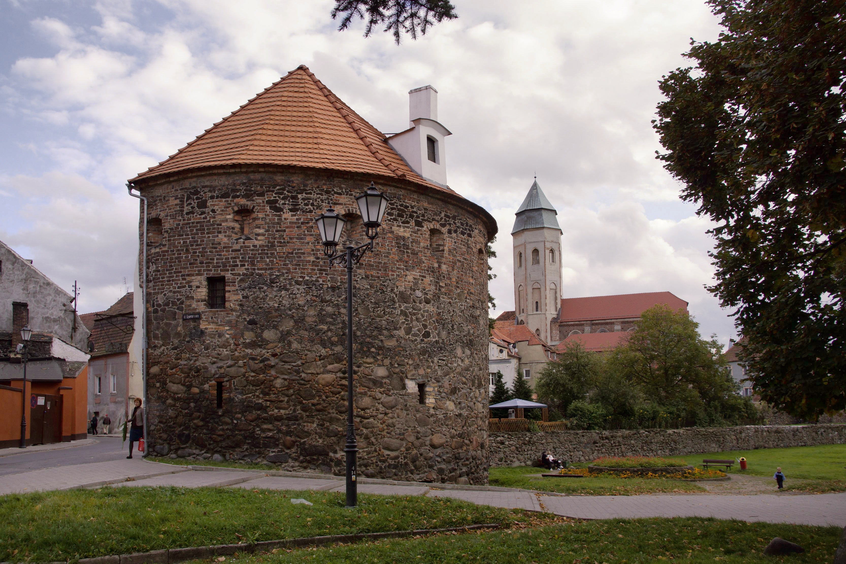 Kożuchów - mury obronne z basztami, mur., XIII, XV w.: Baszta Krośnieńska (zabytek nr 95 z 16.04.1958)